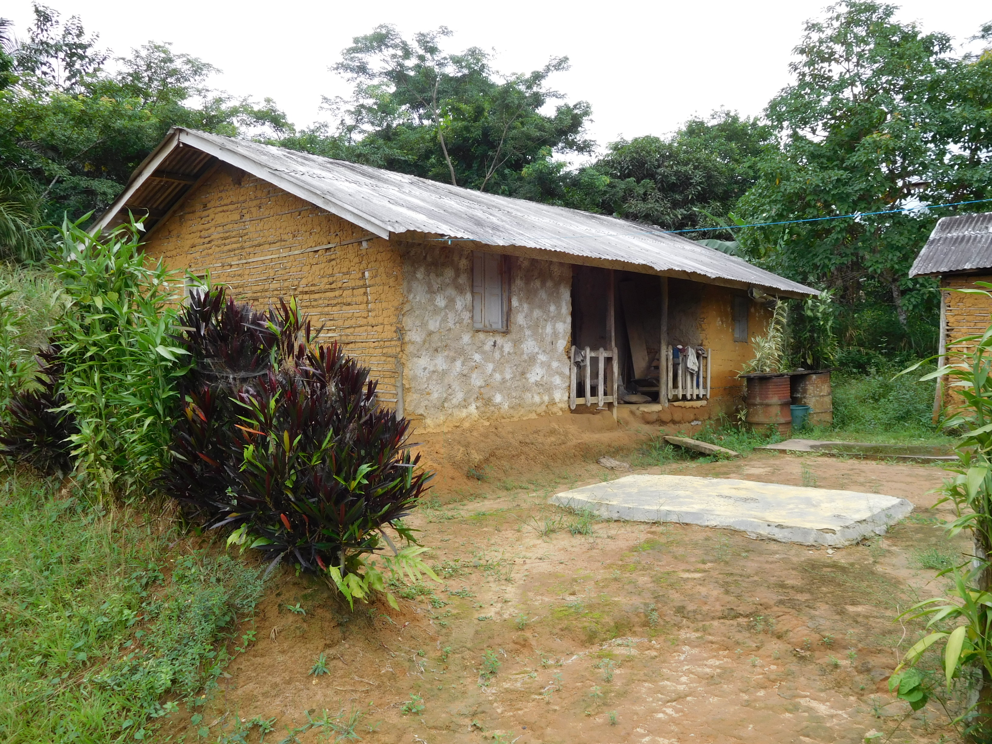 Maison rurale en adobe (Tayap, région du Centre, Cameroun)